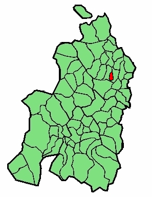 aipaturiko udalerriaren kokapena Nafarroa Beherean